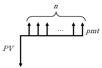 Exemplo de Fluxo Financeiro contendo PV pmt e n